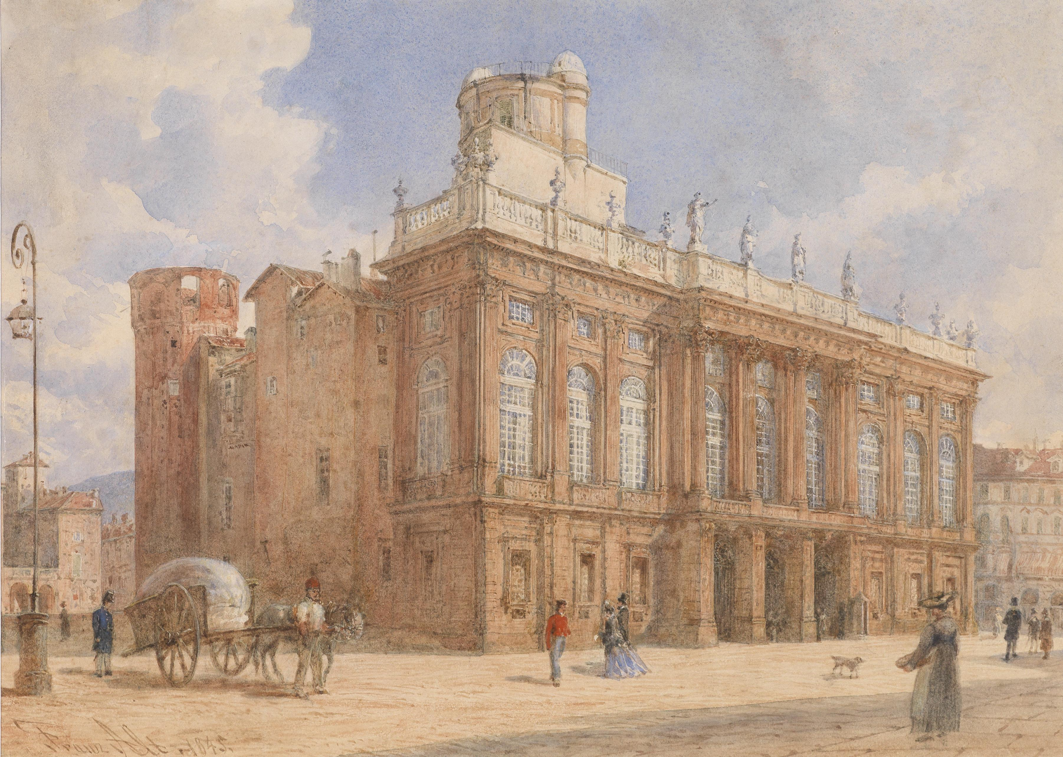 Ansicht des Castello Reale in Turin